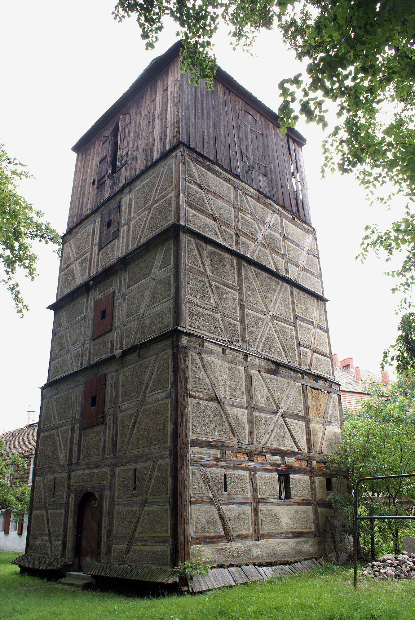 Świdnica, kościół ewangelicki (Pokoju), poł. XVII, XVIII